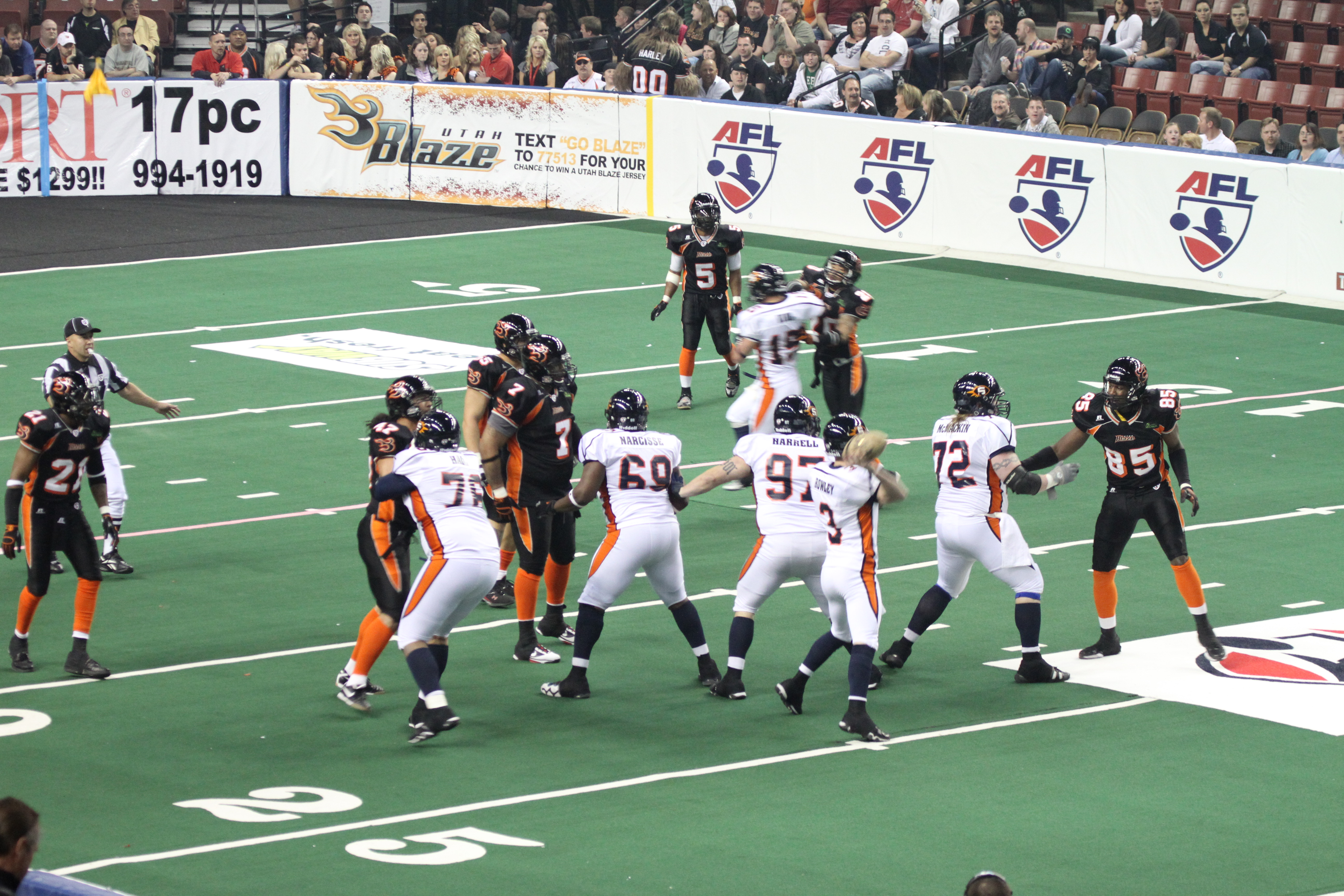 Spokane Shock vs. Utah Blaze